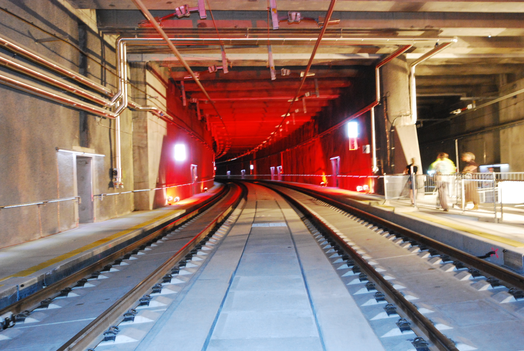 Der Lainzer Tunnel im Bereich der Altmannsdorfer Straße in Wien-Meidling. Links geht es nach Wien Meidling, rechts nach Wien Inzersdorf